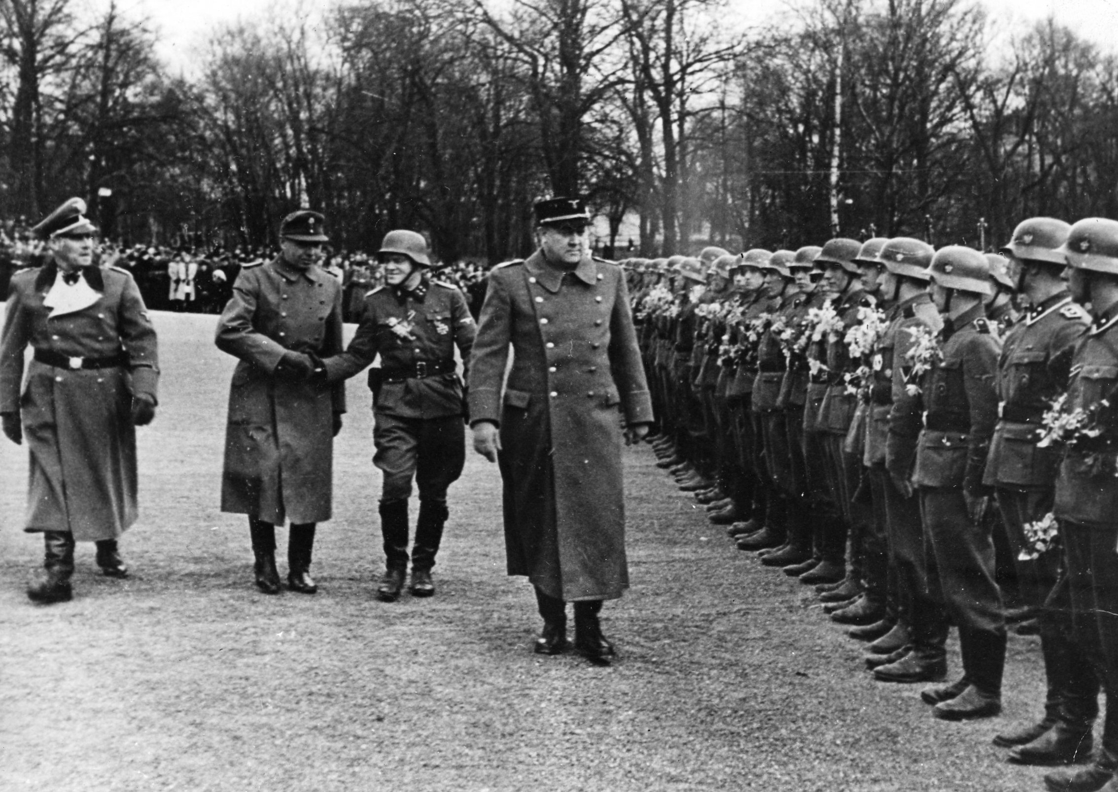 I følge et liknende foto i Aftenposten onsdag 7. april 1943 viser bildet ministerpresident Vidkun Quisling som inspiserer hjemvendte frontkjempere på Slottsplassen om ettermiddagen tirsdag 6. april 1943. Se også filmopptak i Filmavisen no. 54 (19. april) 1943 : «1. Mønstring av hjemvendte frontkjempere»: «Det første politikompaniet er kommet heim og sammen med det en stor skarve permitterte soldater fra Den norske legion. Frontkjemperne fikk en verdig og begeistret mottakelse i Oslo. Først stilte frontkjemperne opp til mønstring på Festningsplassen. En rekke høgre norske og tyske militære var til stede. Avdelinger av Småhirden og Gjentehirden overrakte hver enkelt en vakker bukett av vårens blomster og lauv. Paraden og defileringen foran Føreren foran Slottet ble en kort, men stemningsfull høytidelighet. Blant de frammøtte personligheter såes en rekke representanter for stat og parti med samtlige ministre i spissen. Avdelingene stod oppstilt med front mot Slottet da Føreren kom ut på plassen. Føreren holdt så en tale og takket frontkjemperne for hva de hadde gjort for Norge. Deretter defilerte avdelingene for Føreren.» (Feilaktig beskrivelse i Flickr: Dette bildet er tatt da politikompaniet av Den Norske Legion paraderte for Quisling før avreisen til østfronten i 1942. Paraden er, som en ser, henlagt til Slottsplassen. Edsavleggelsen foregikk på tysk for den tyske politigeneralen ved leiren i Holmestrand. Bildet viser Jonas Lie gjøre honnør for Quisling. 1942/10/01.) RA/PA-1209/Ue 97/ (img115)